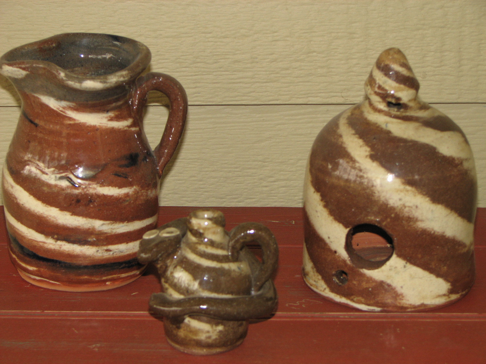 Burlon Craig Swirl WAre